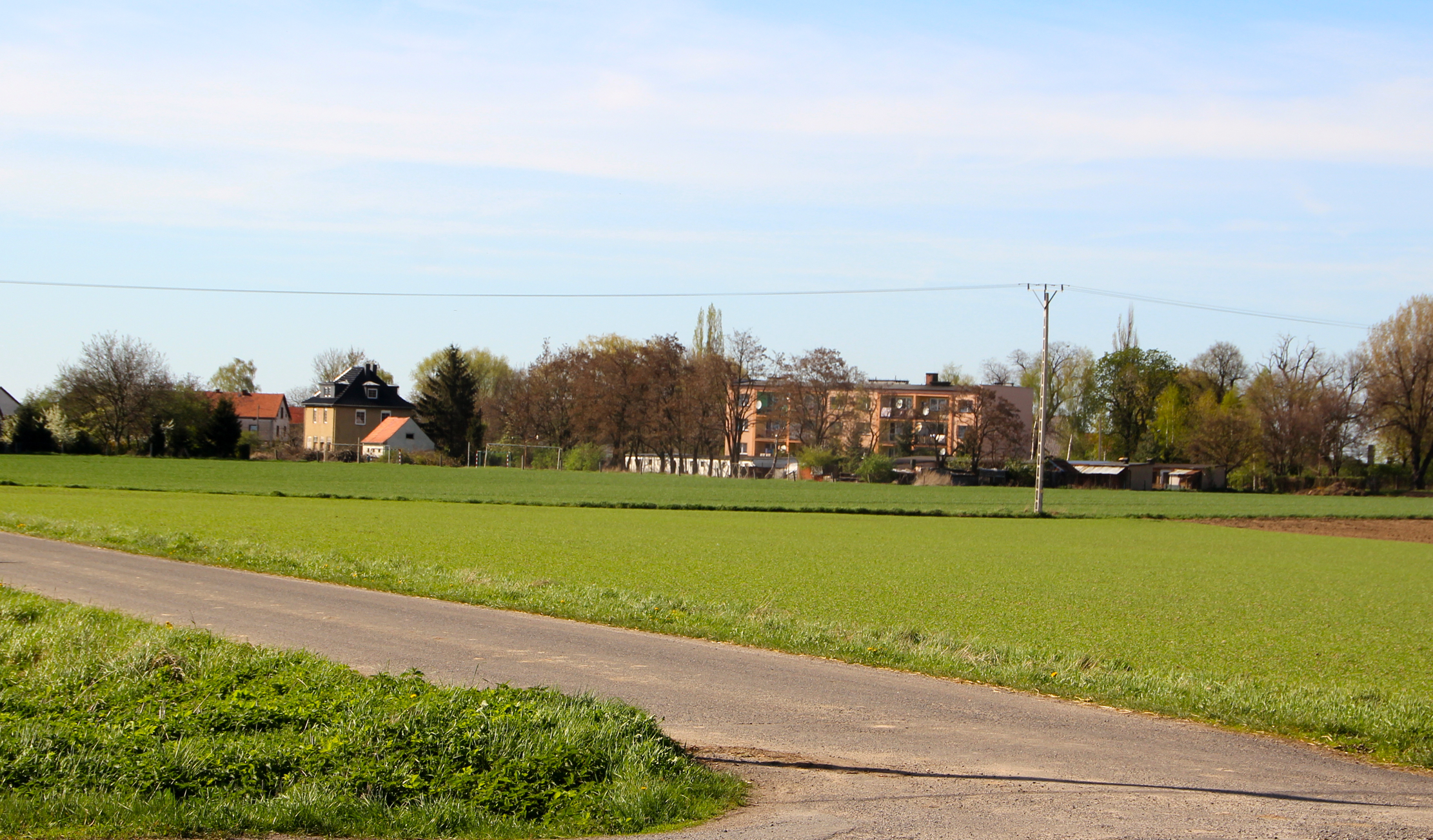 Głogowiec wieś w Polsce położona w województwie opolskim, w powiecie prudnickim, w gminie Głogówek.